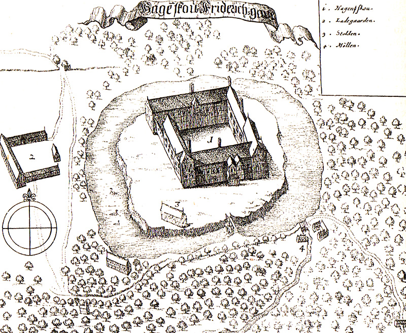 Hagenskov eller Frederiksgave var oprindeligt en dansk middelalderborg og er nævnt som krongods i 1251. Hagenskov var et kongeligt len.